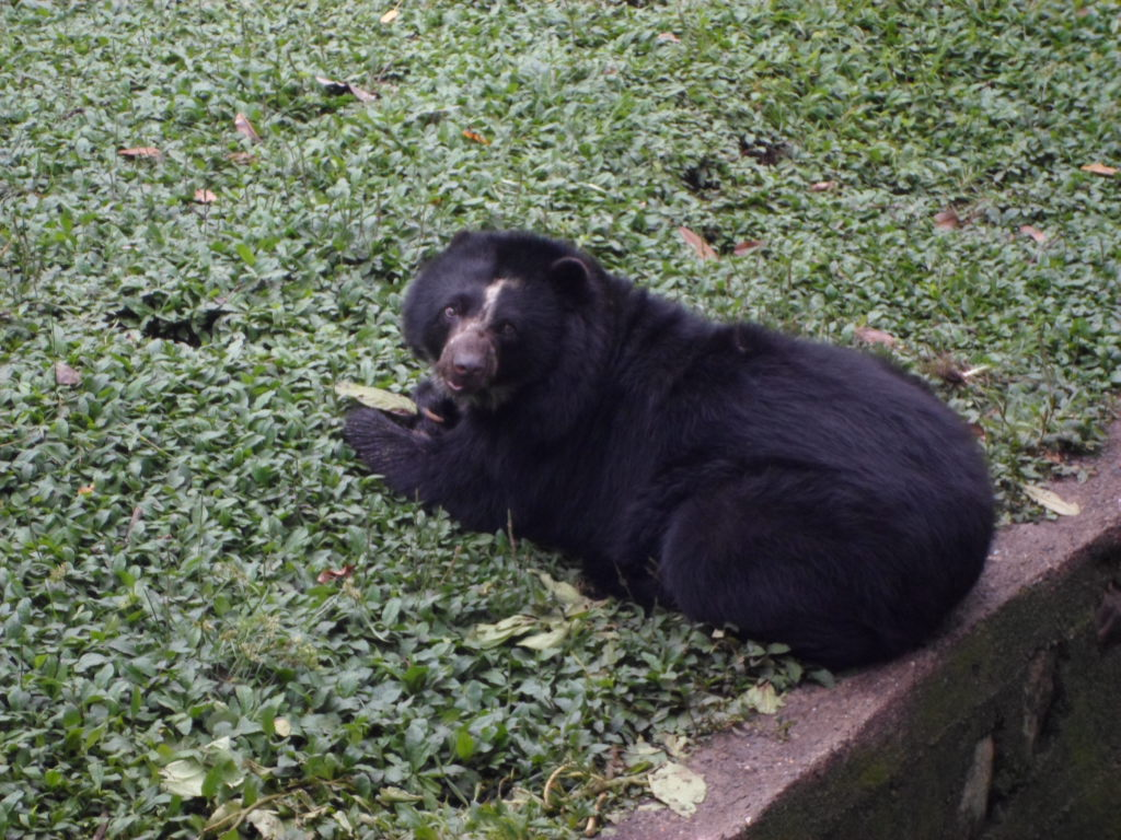 Oso de anteojos en el zoológico Matecaña (Pereira)